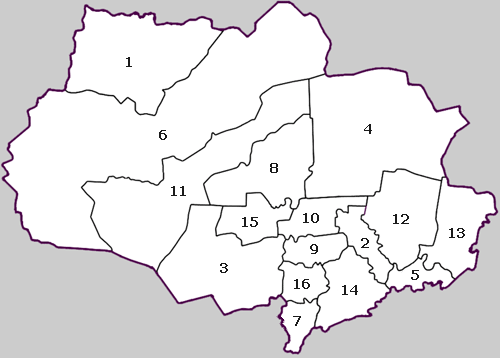 Карта районов Томской области